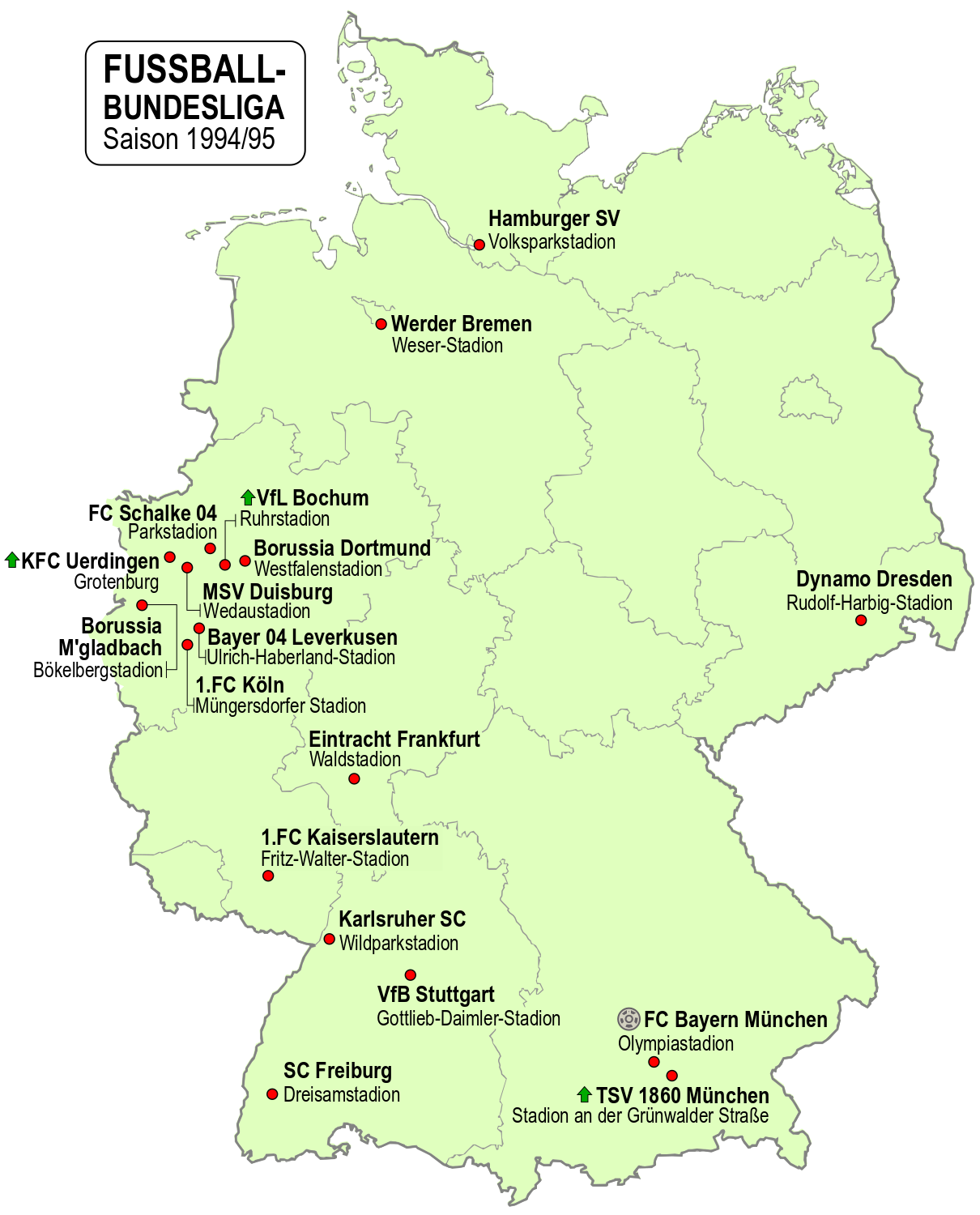 Karte der Vereine der Fussball-Bundesliga-Saison 1994/95